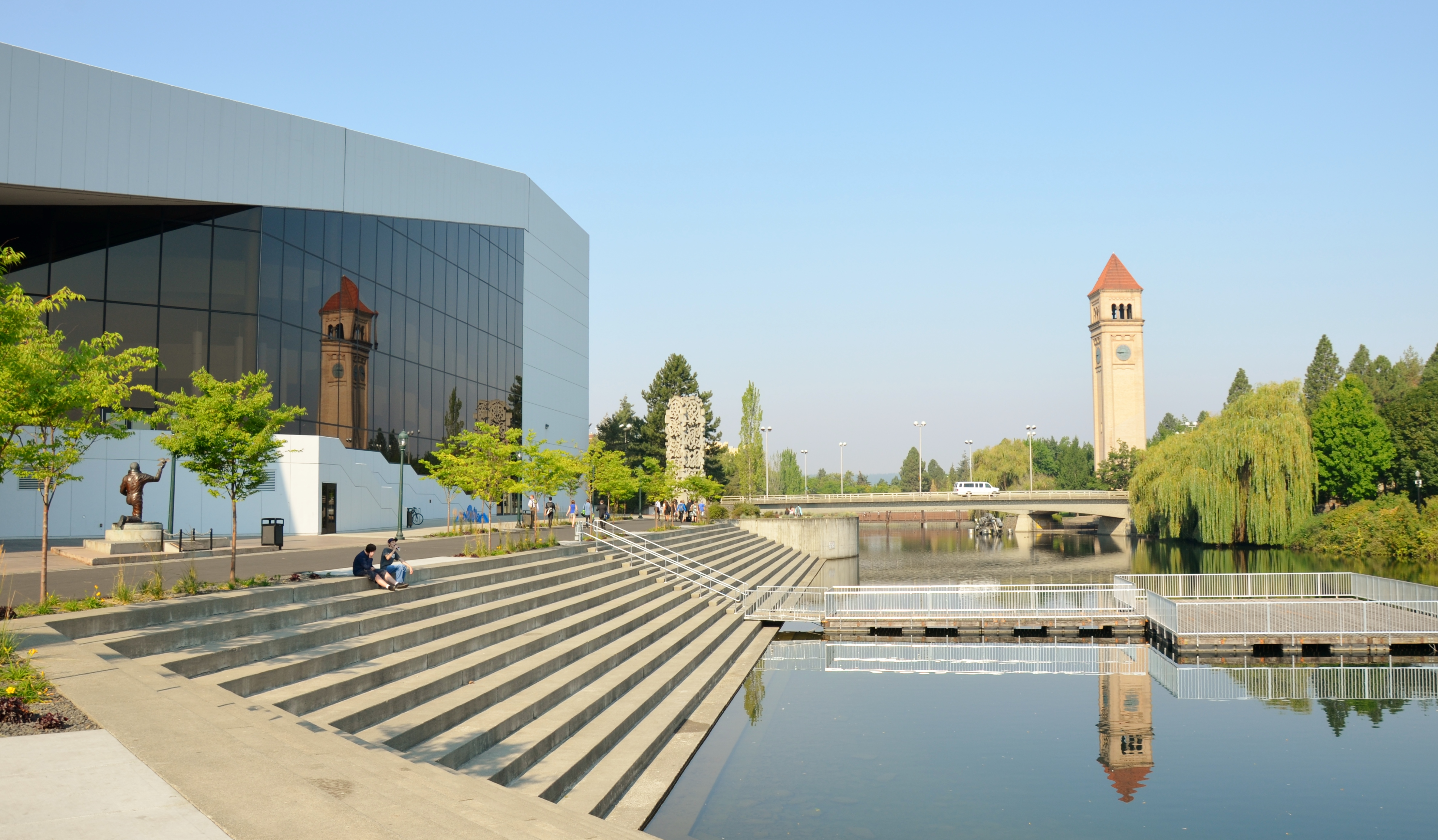 Riverside, Spokane, WA, USA